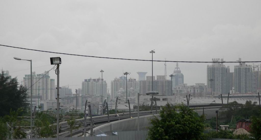 HK Lok Ma Chau Line